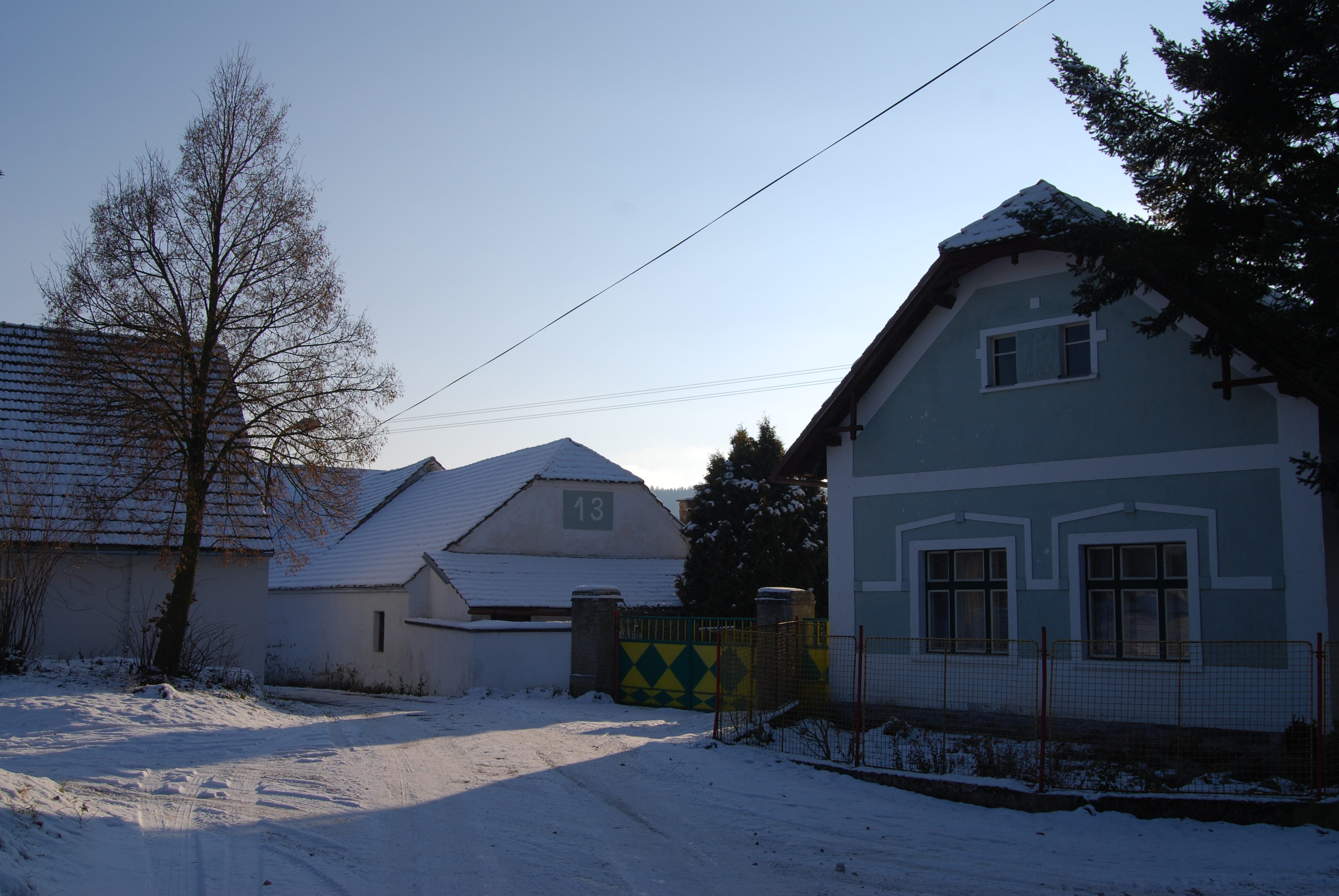 Stavení v obci. Kakovice je část města Mirovice v okrese Písek. Česká republika.